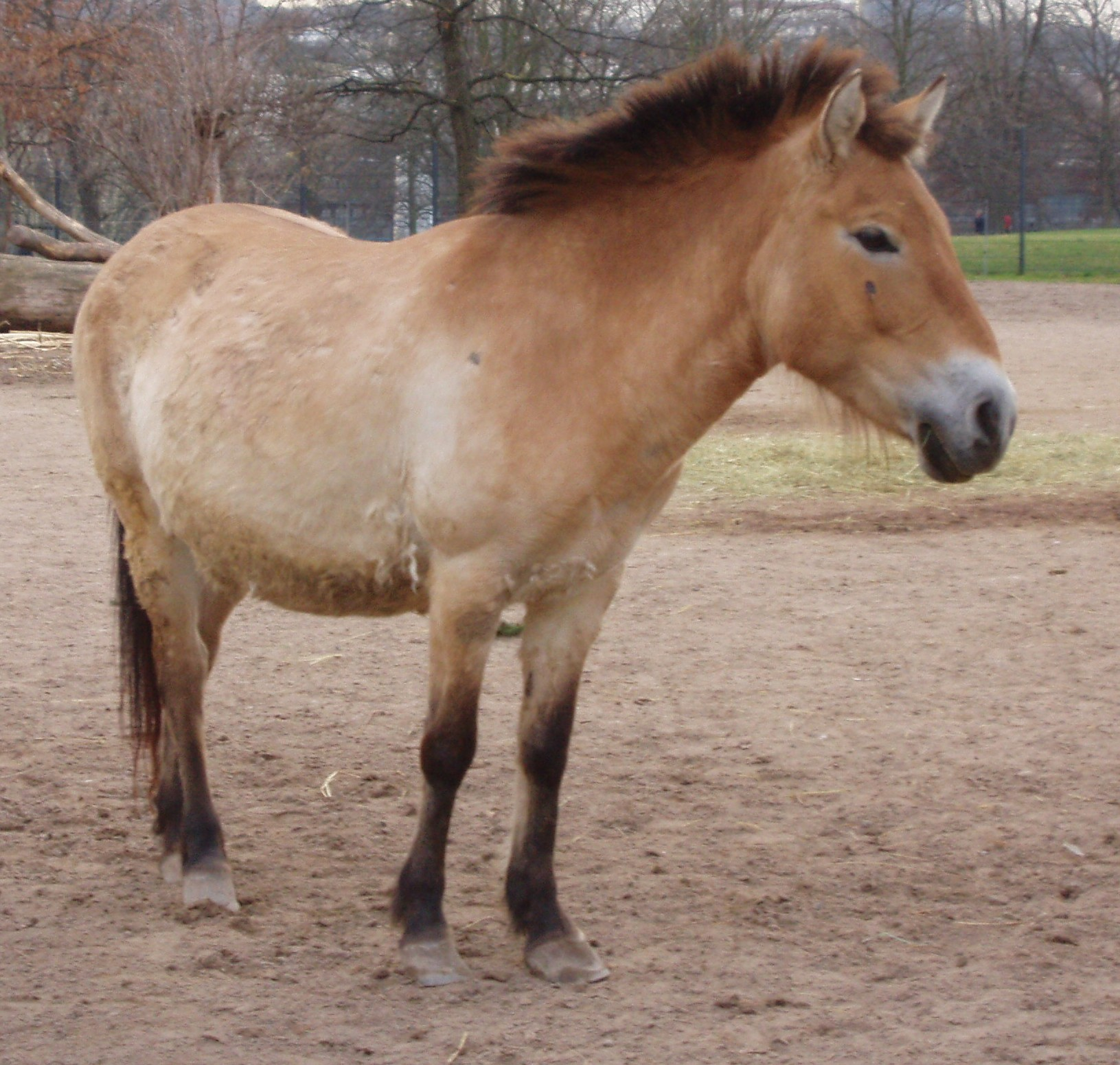 Przewalskipferd in der Wilhelma